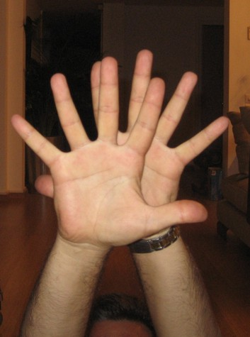 Double Moutza.